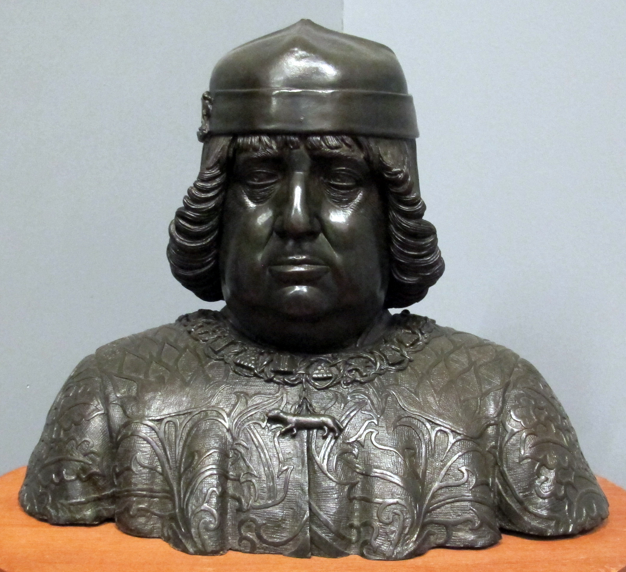 Galleria Napoletana (Museo di Capodimonte)